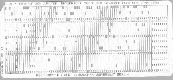 Lochkarte, selbst erstellt